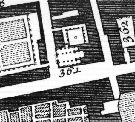 Pianta di Nolli